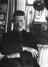 Walter Gropius soldat